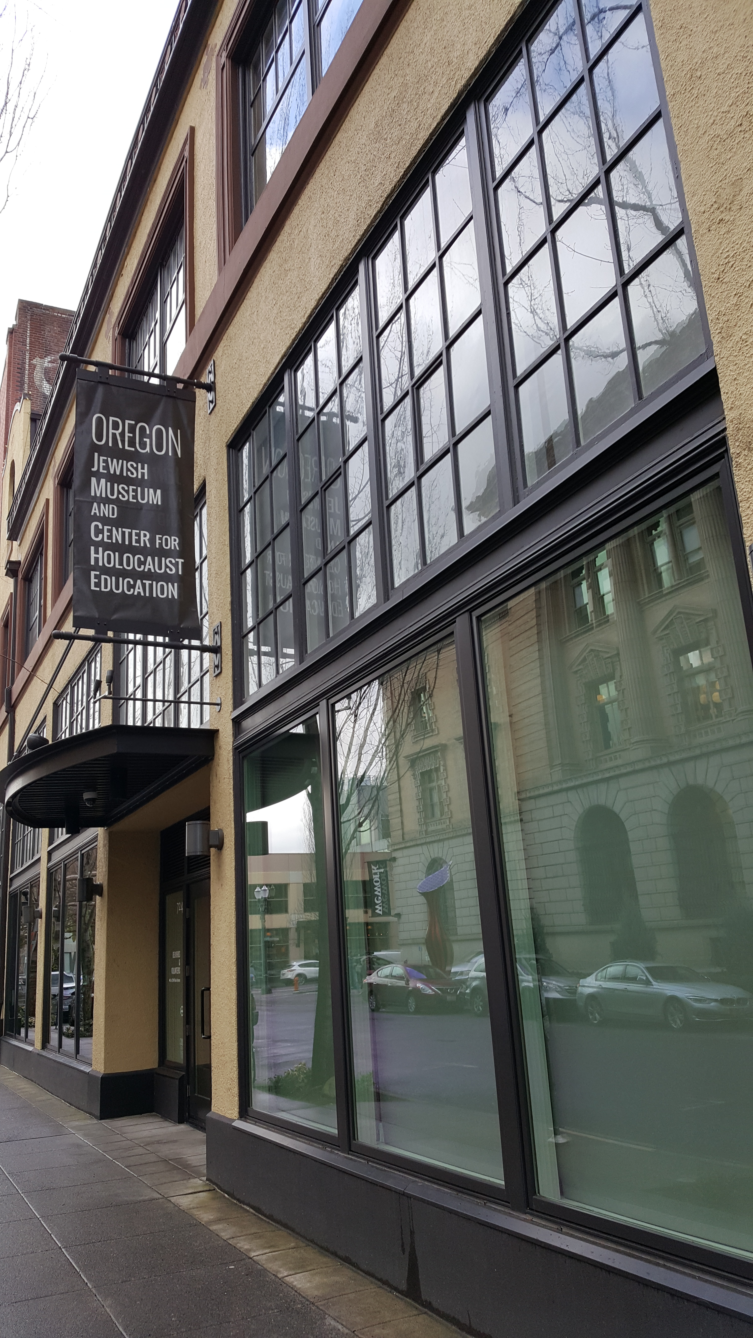 Oregon Jewish Museum